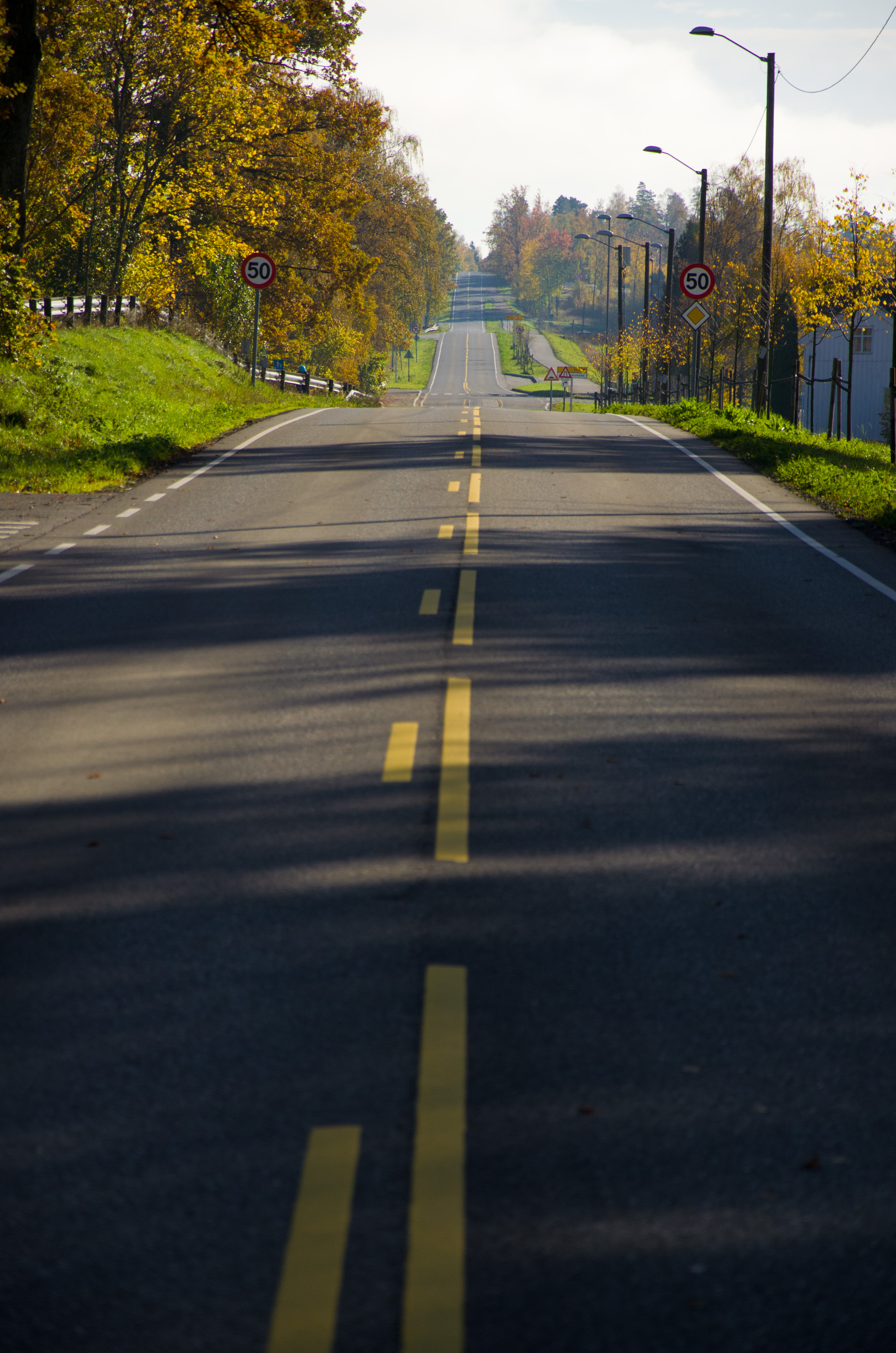 Vestfolds Fylkesvei 650 Undrumsdalveien